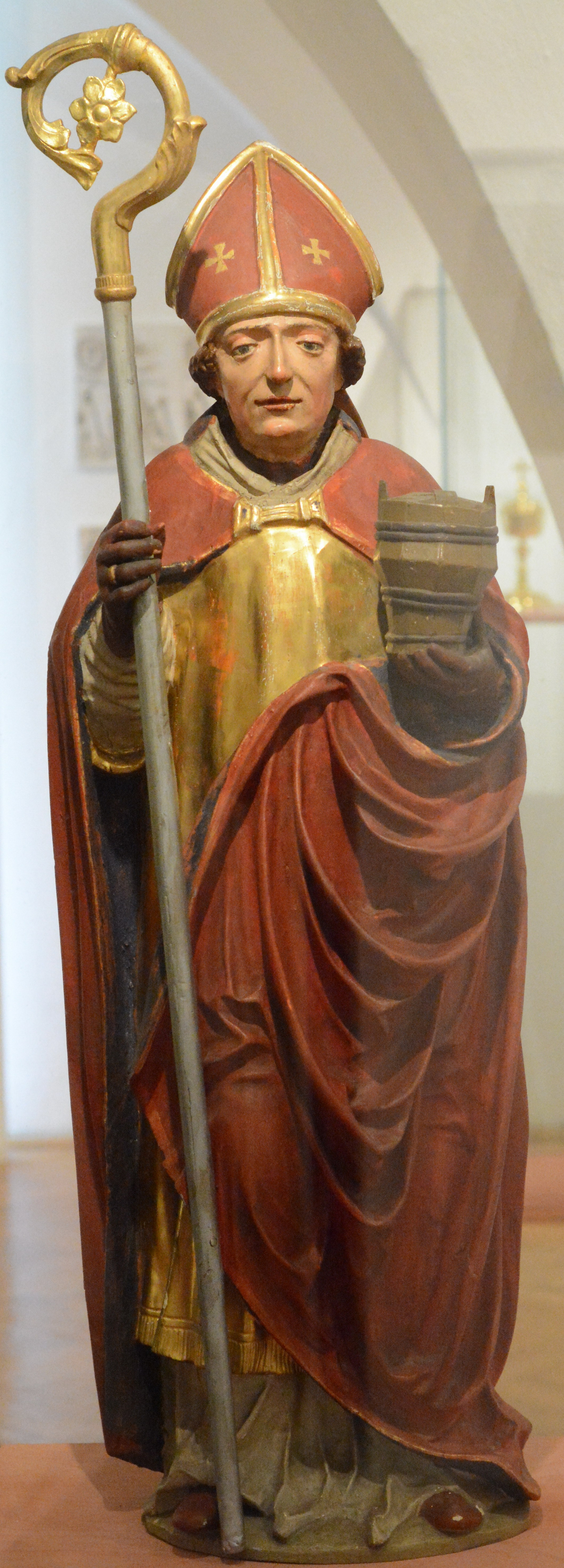 Basilika Seckau, Kreuzaltar, Heiliger Rupert (1517); die Statue befindet sich derzeit in der Dauerausstellung "Die Welt der Mönche" in der Abtei Seckau.